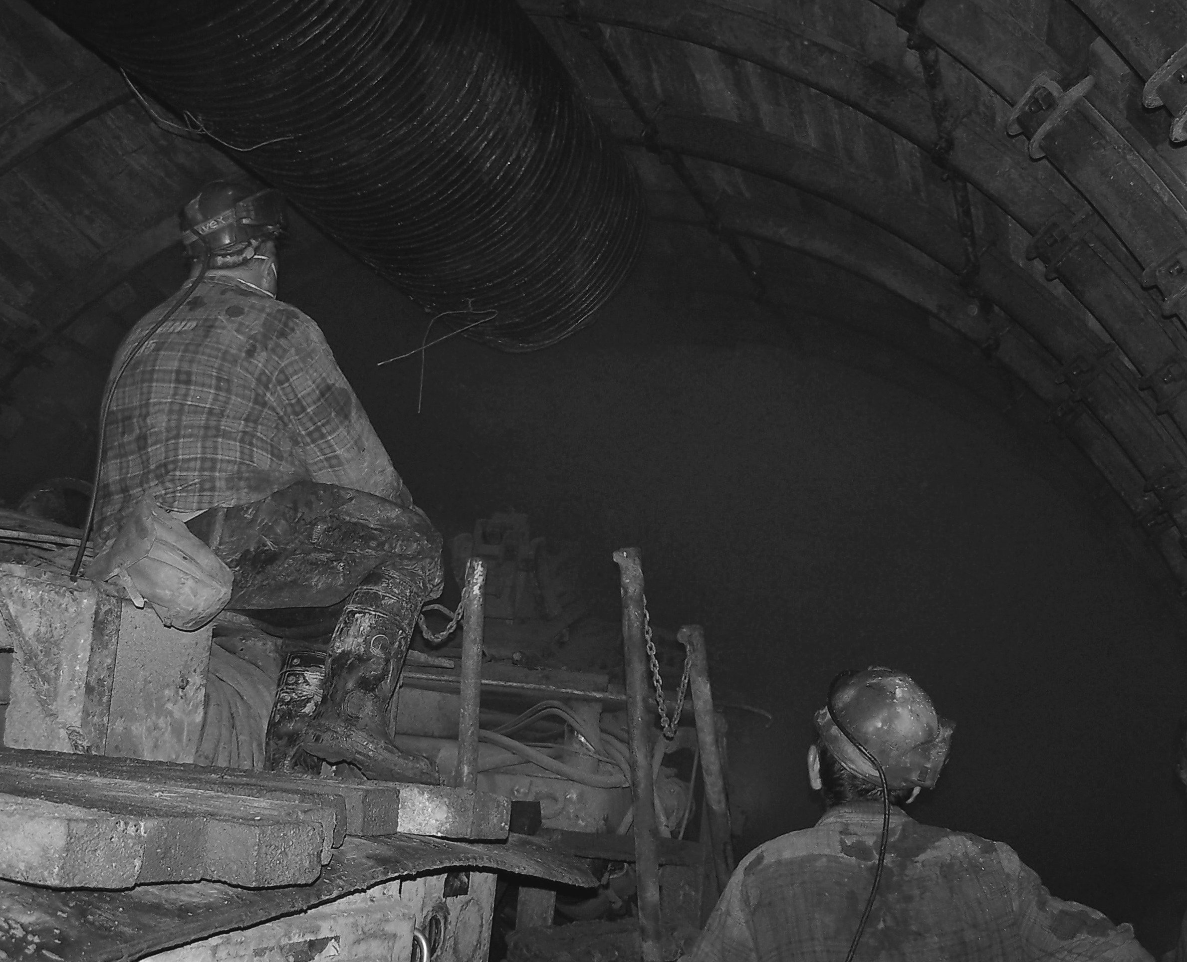 wersja rozjaśniona.